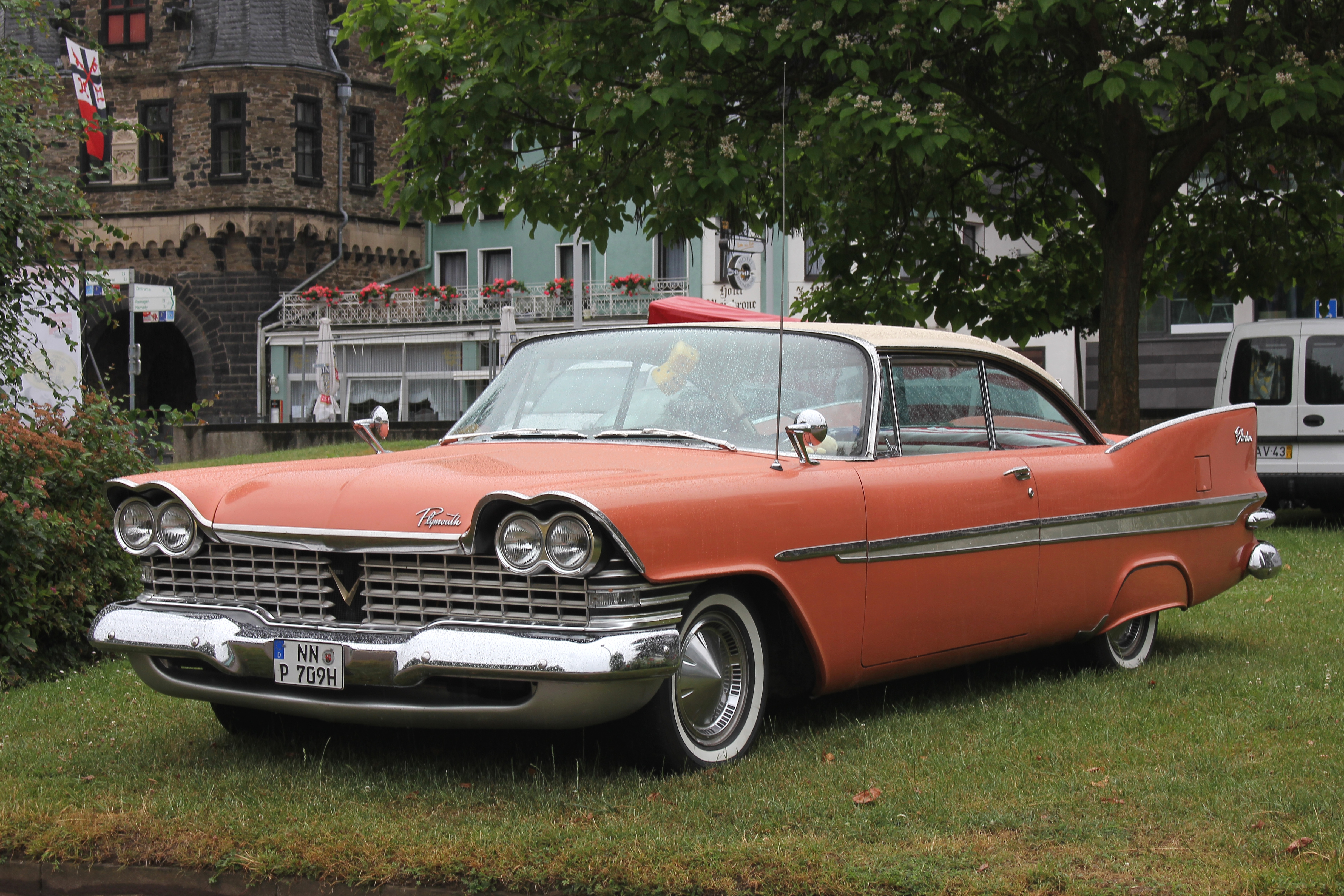 Plymouth Belvedere, Baujahr 1959, V8-Motor, 5950 cm³, Dreigangautomatik (Kennzeichen verändert)